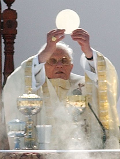 Cerimônia de canonização do frade brasileiro Frei Galvão celebrada pelo papa Bento XVI no Campo de Marte em São Paulo, Brasil. (fragment)